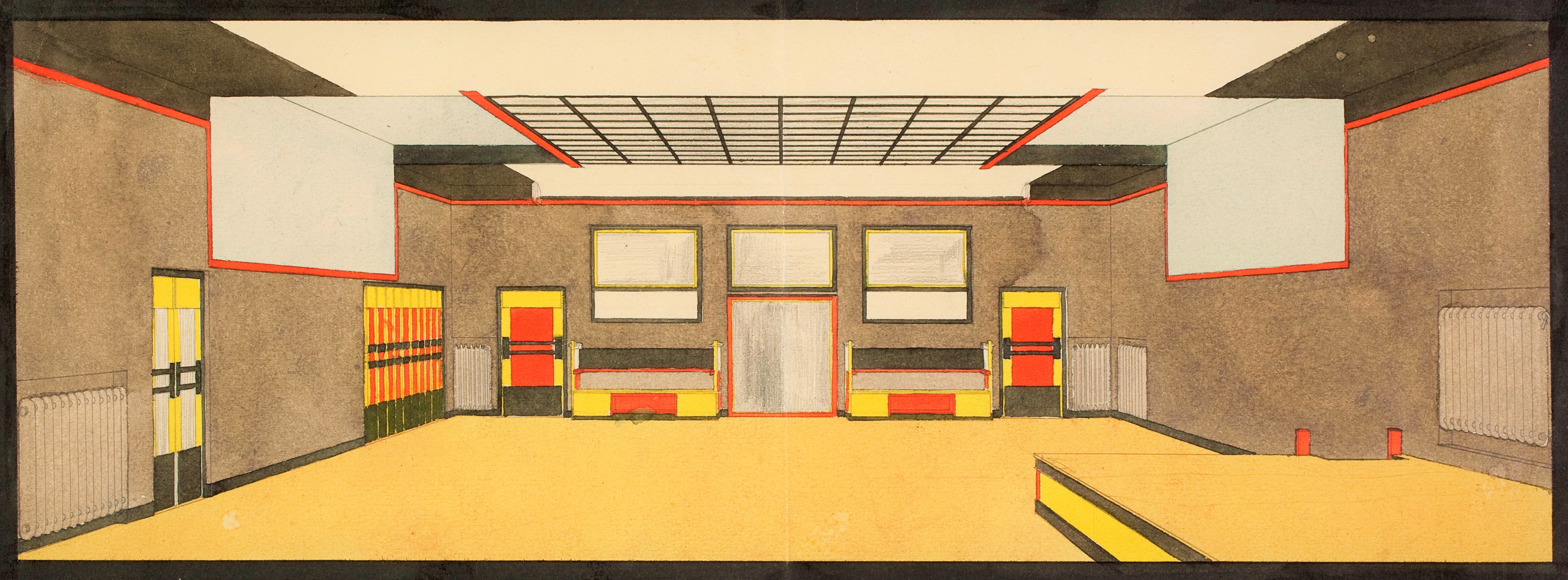 Jan Wils, Piet Zwart, projet pour une académie de danse à La Haye, 1920 (image du domaine public modifiér)